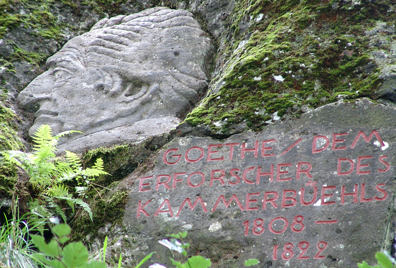 Gedenkstein an Johann Wolfgang von Goethe, der am Vulkan Komorní hùrka (deutsch: Kammerbühl) seine wissenschaftlichen Studien betrieb